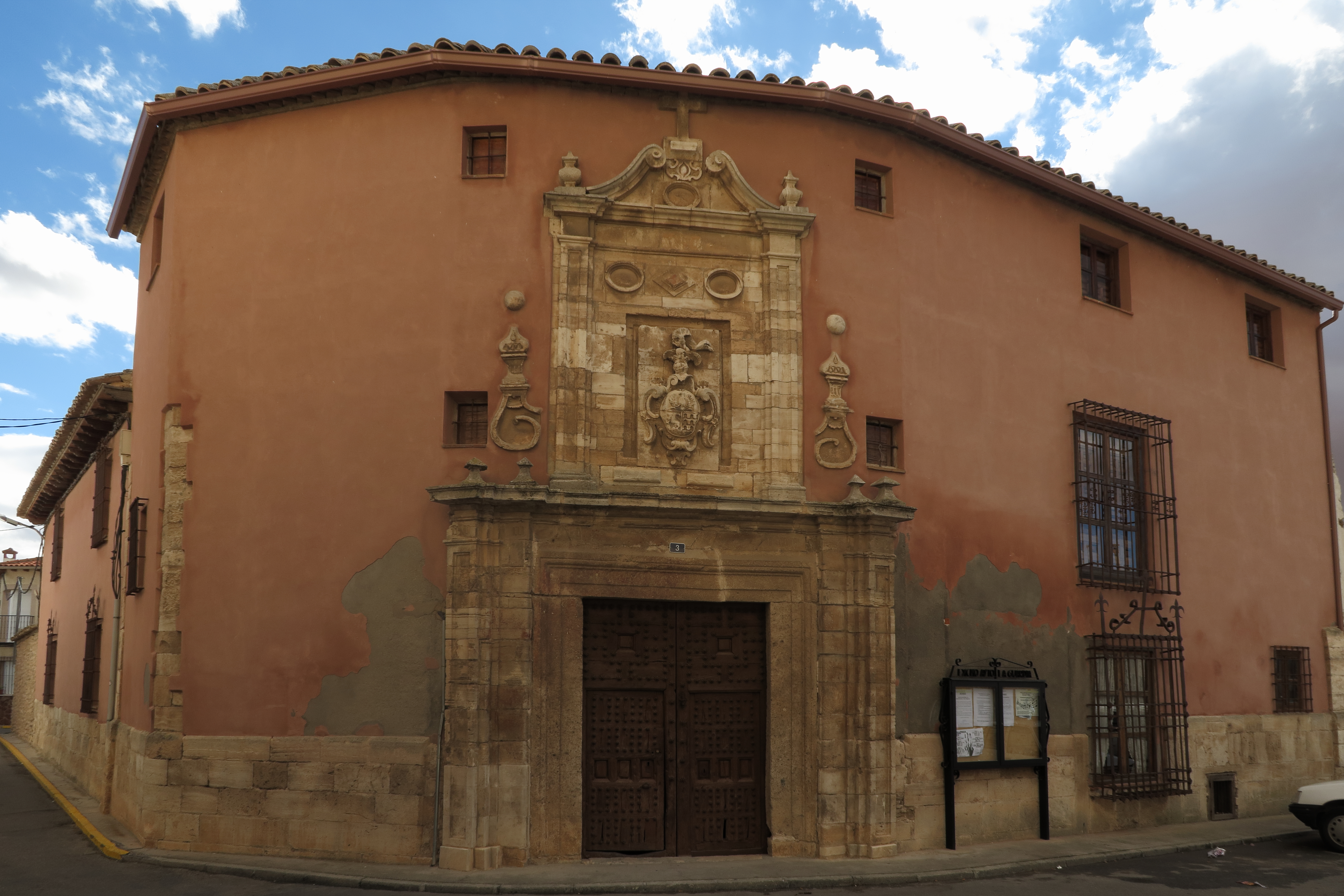 Casa de los Jaenes(Casa de la Inquisición o Casa de Don Eulogio)